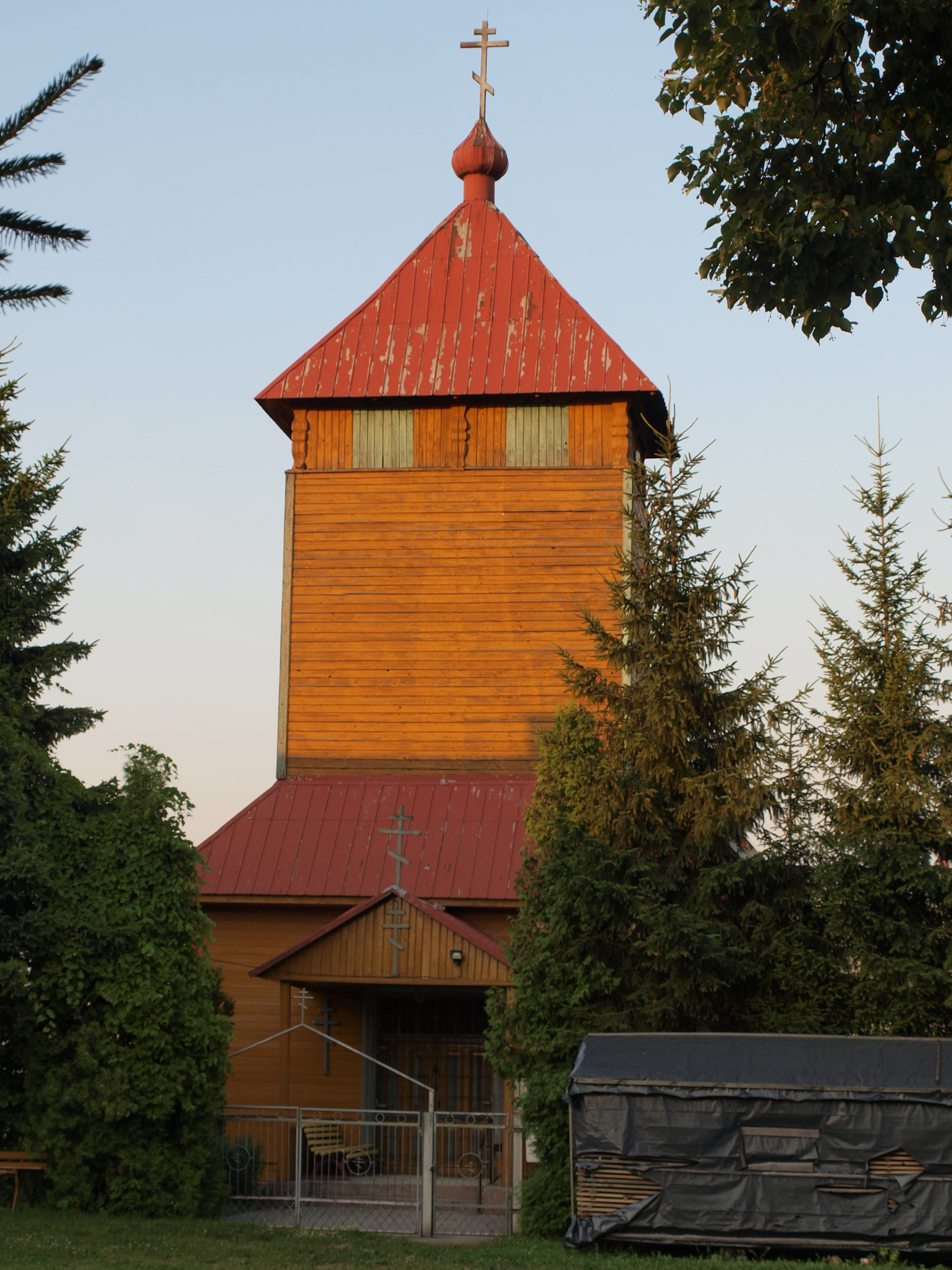 Molenna staroobrzędowców Suwałki, ul. Sejneńska 37A 05.1980.